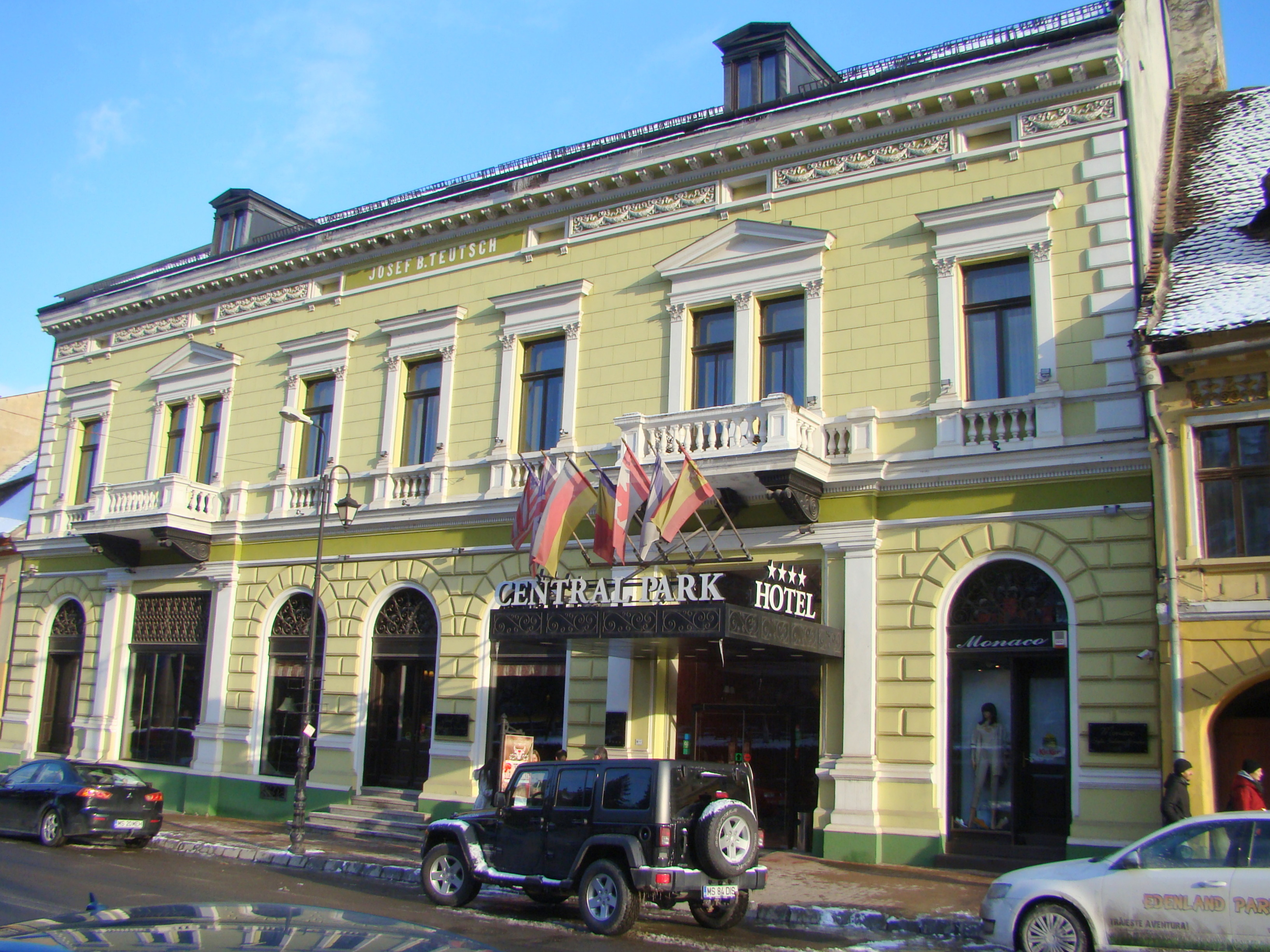 Casă, municipiul Sighișoara, Piața Oberth Hermann 25 1400 - 1450,1800 - 1850